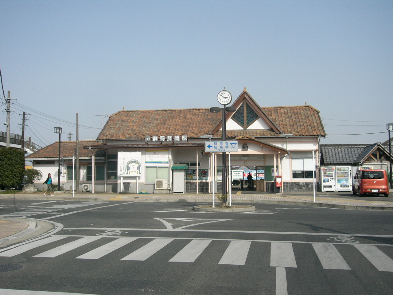 Gunma-Fujioka Station